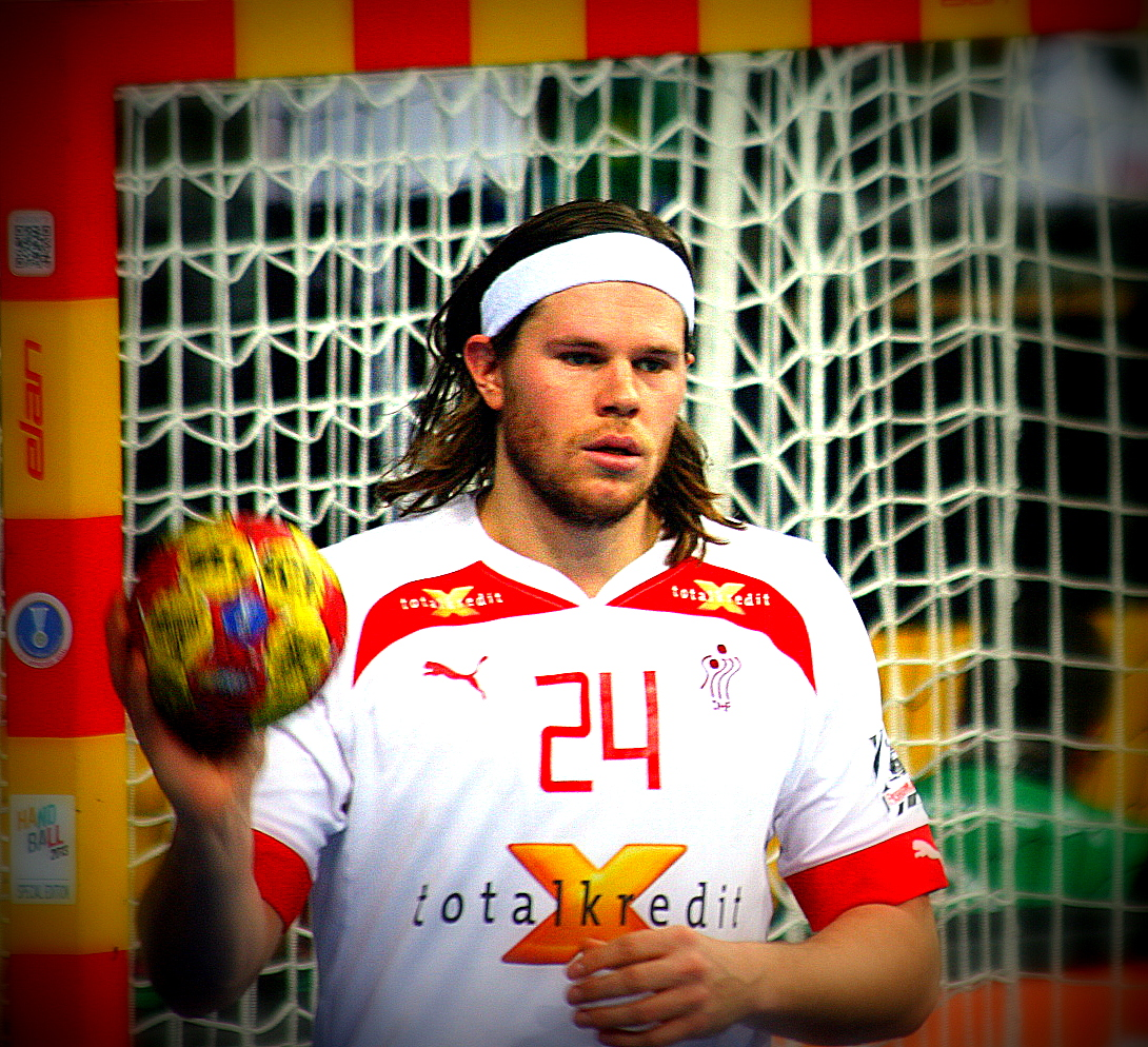 Mikkel Hansen pendant la demi-finale Danemark-Croatie du Championnat du monde de handball 2013